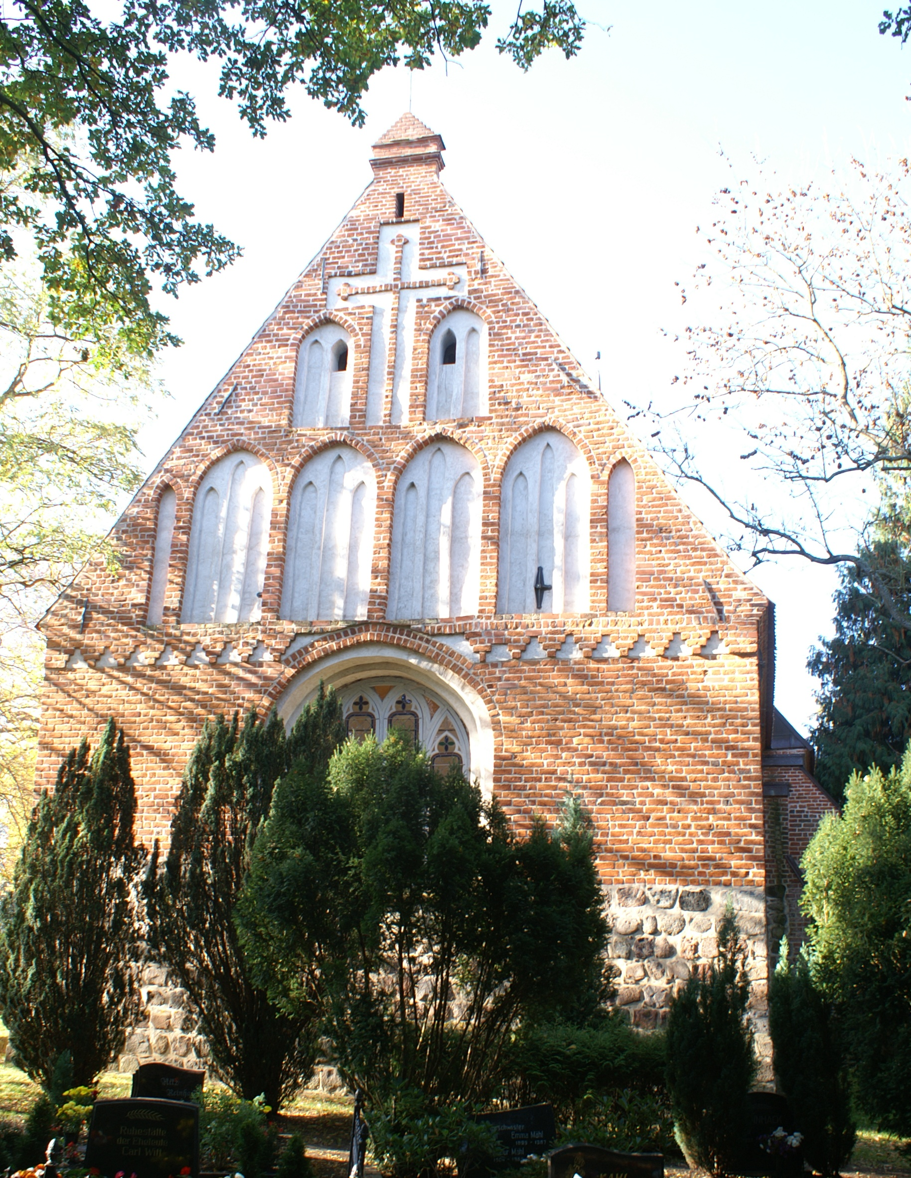 Dorfkirche in Hohendorf - Landkreis Ostvorpommern - Ostgiebel